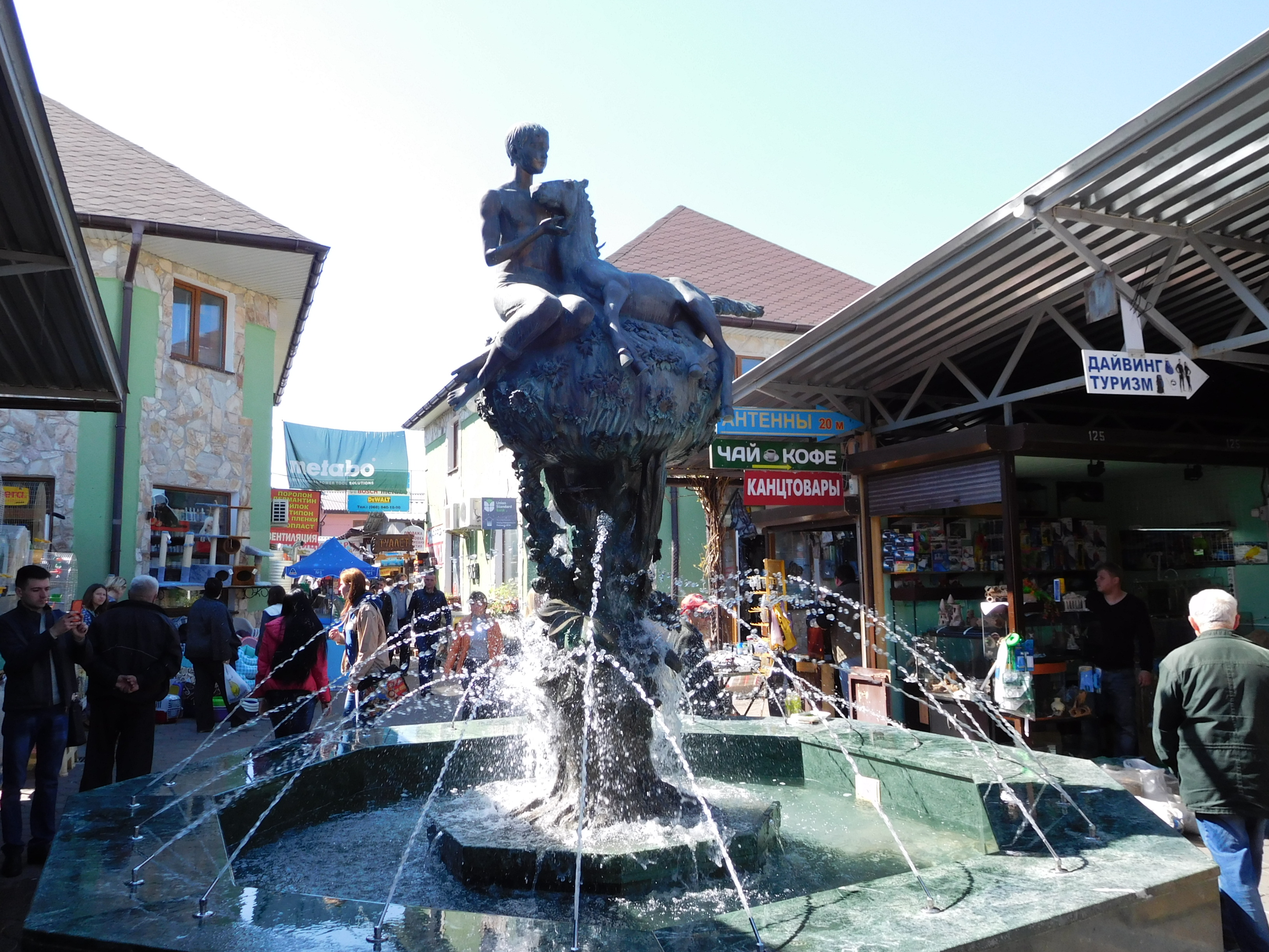 Старокінний ринок, Одеса